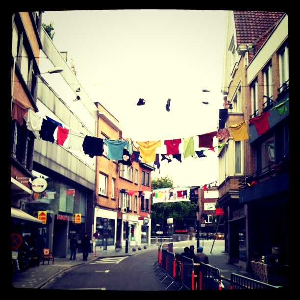 Kunstproject heropleving budastraat